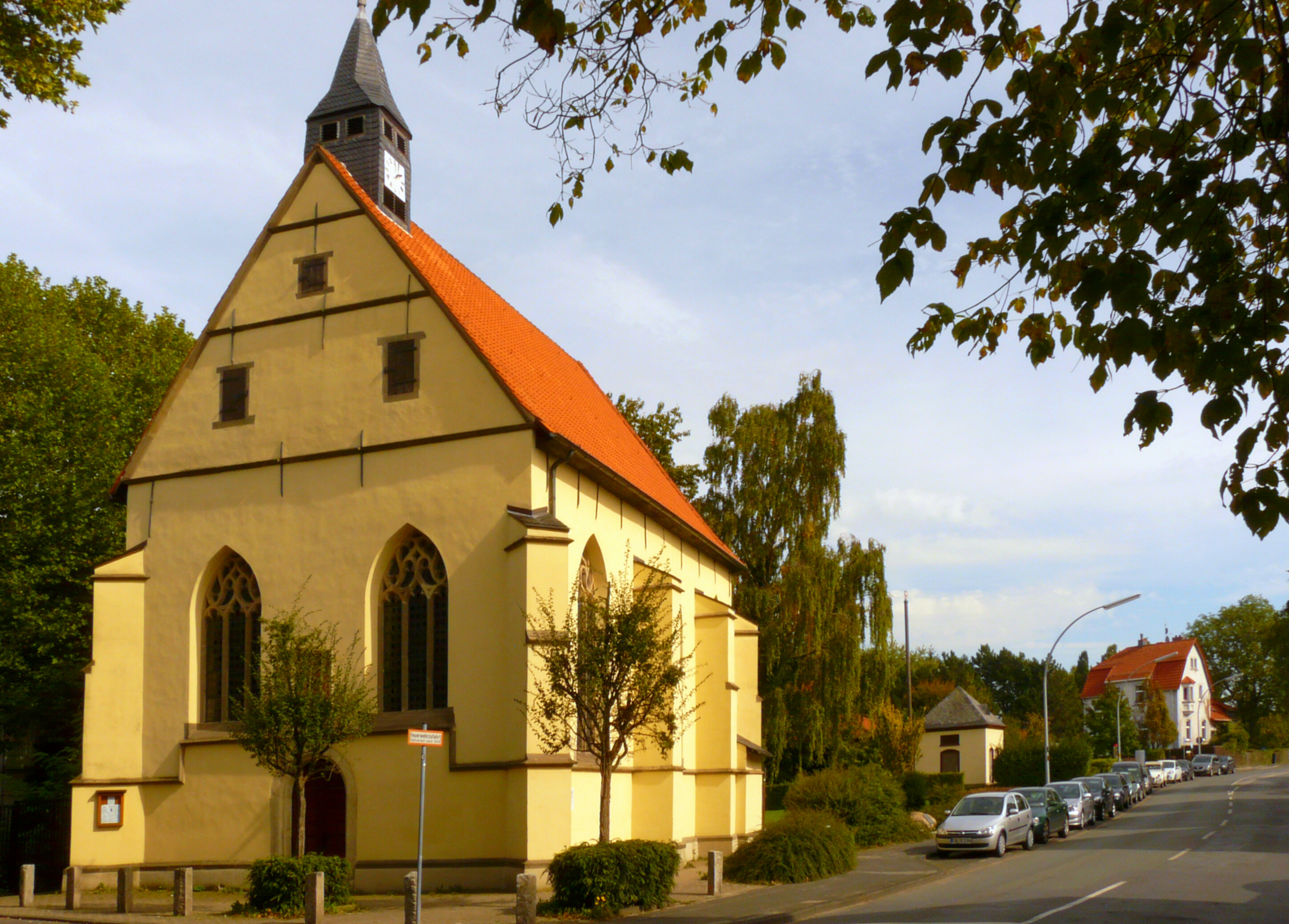 Alte Pfarrkirche St. Maria Magdalena in Datteln-Horneburg